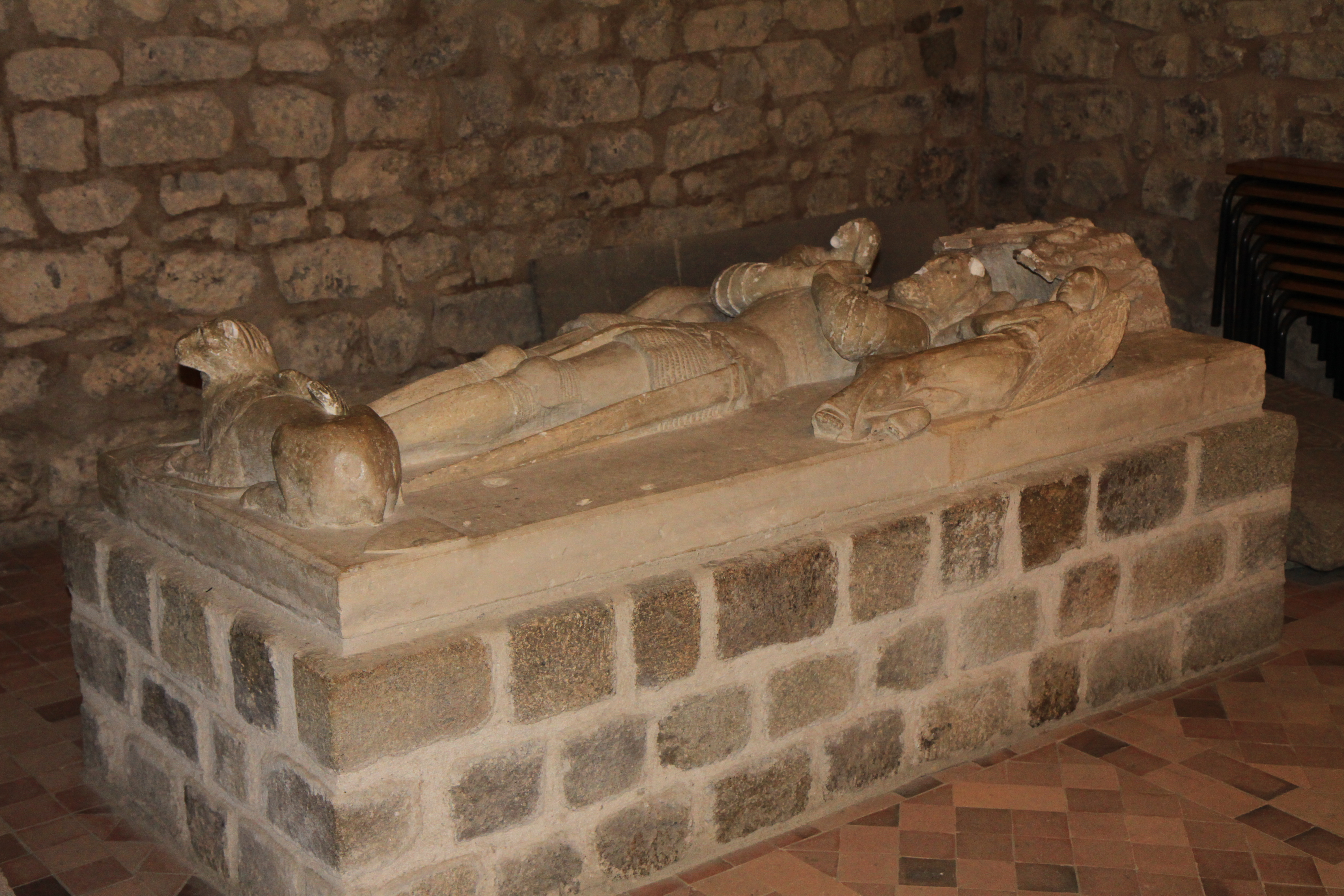 Le gisant de Pierre Ledin de la Châlerie, ancien gouverneur présumé de la ville de Domfront, revêtu de son armure..